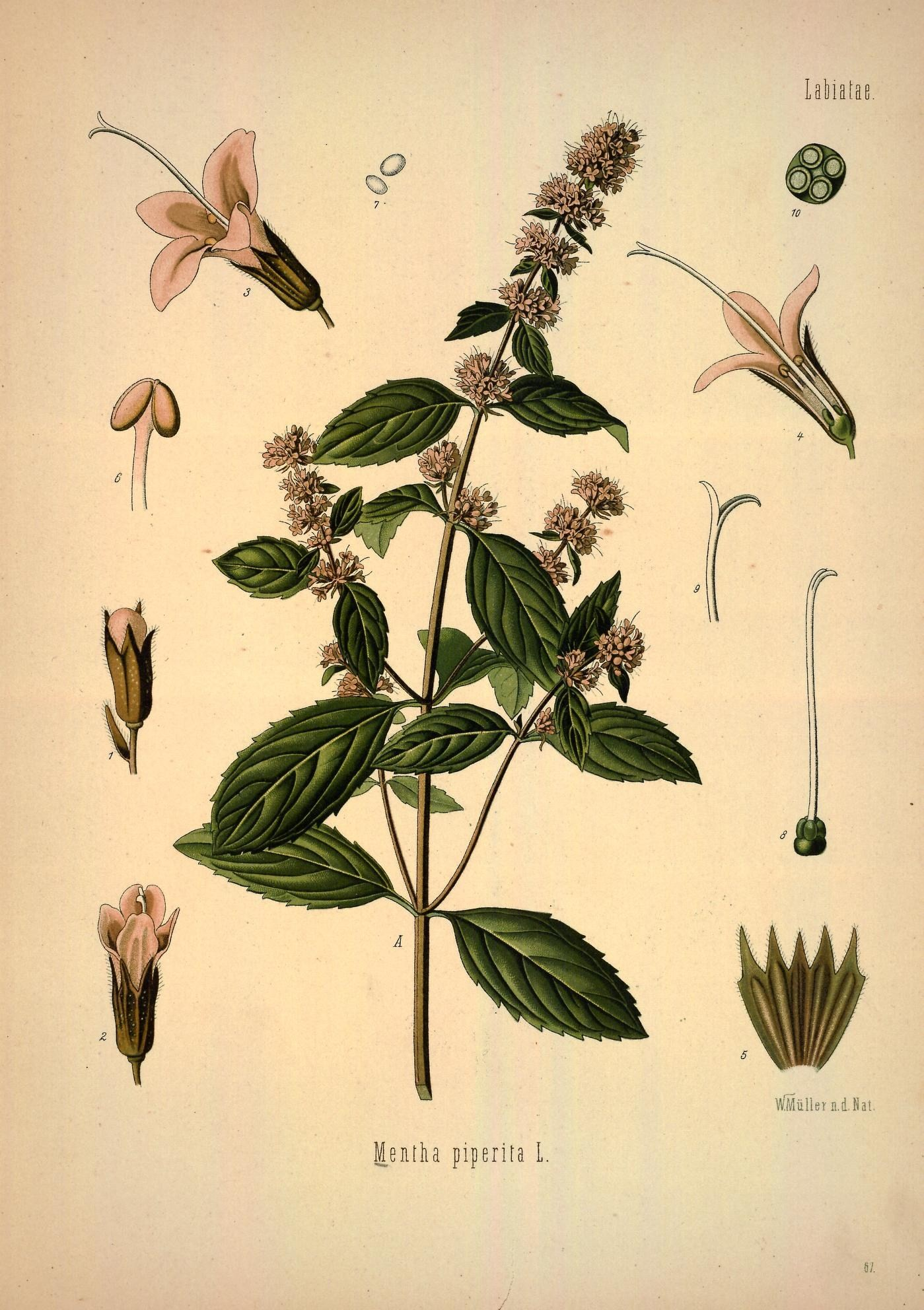 Pfefferminze. Mentha piperita L. A blühender Stengel in natürl. Grösse. 1 Knospe, vergrössert; 2 u. 3 Blüthe, desgl.; 4 dieselbe zerschnitten, desgl.; 5 Kelch aufgeschnitten, desgl.; 6 Staubgefäss, desgl.; 7 Pollen, desgl.; 8 Stempel, desgl.; 9 oberer Theil des Griffels mit Narben, desgl.; 10 Fruchtknoten im Querschnitt, desgl.